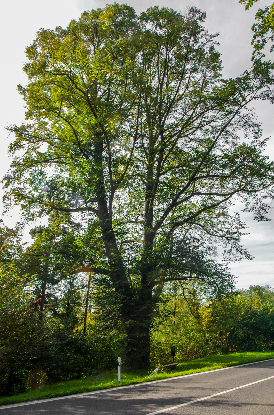 památný strom Lípa u benzinové stanice, Pozorka u Nejdku, okres Karlovy Vary